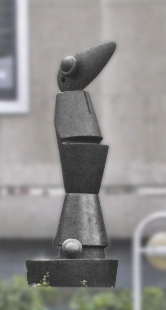 Max Ernst, Habakuk (Nach einem Modell von 1934, Stiftung Wilhelm Hack, Köln, Kunstverein für die Reinlande und Westfalen, Dauerleihgabe an die Stadt Düsseldorf)